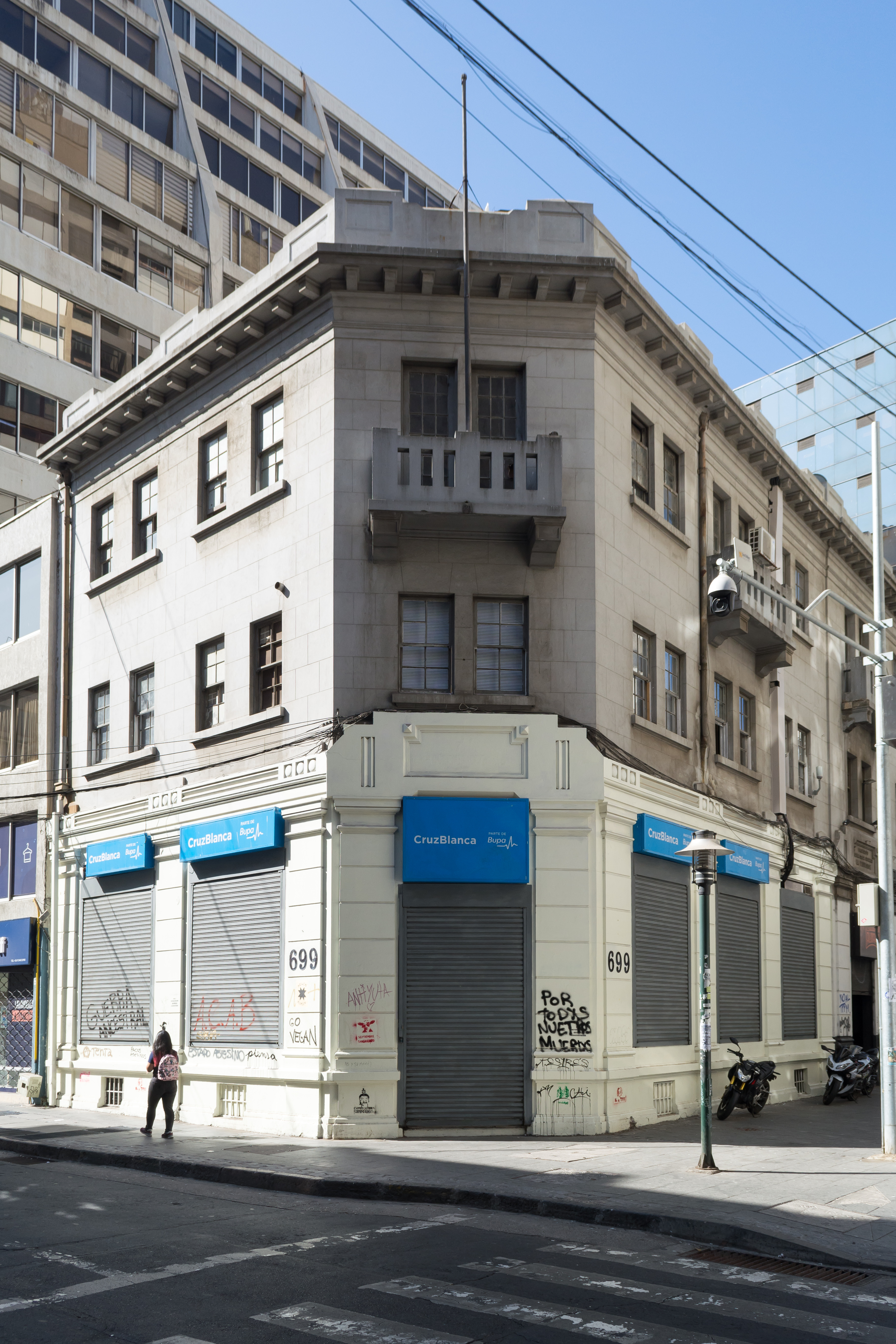 Cruz Blanca, Valparaíso, Región de Valparaíso, Chile